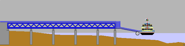 Landungsbrücke